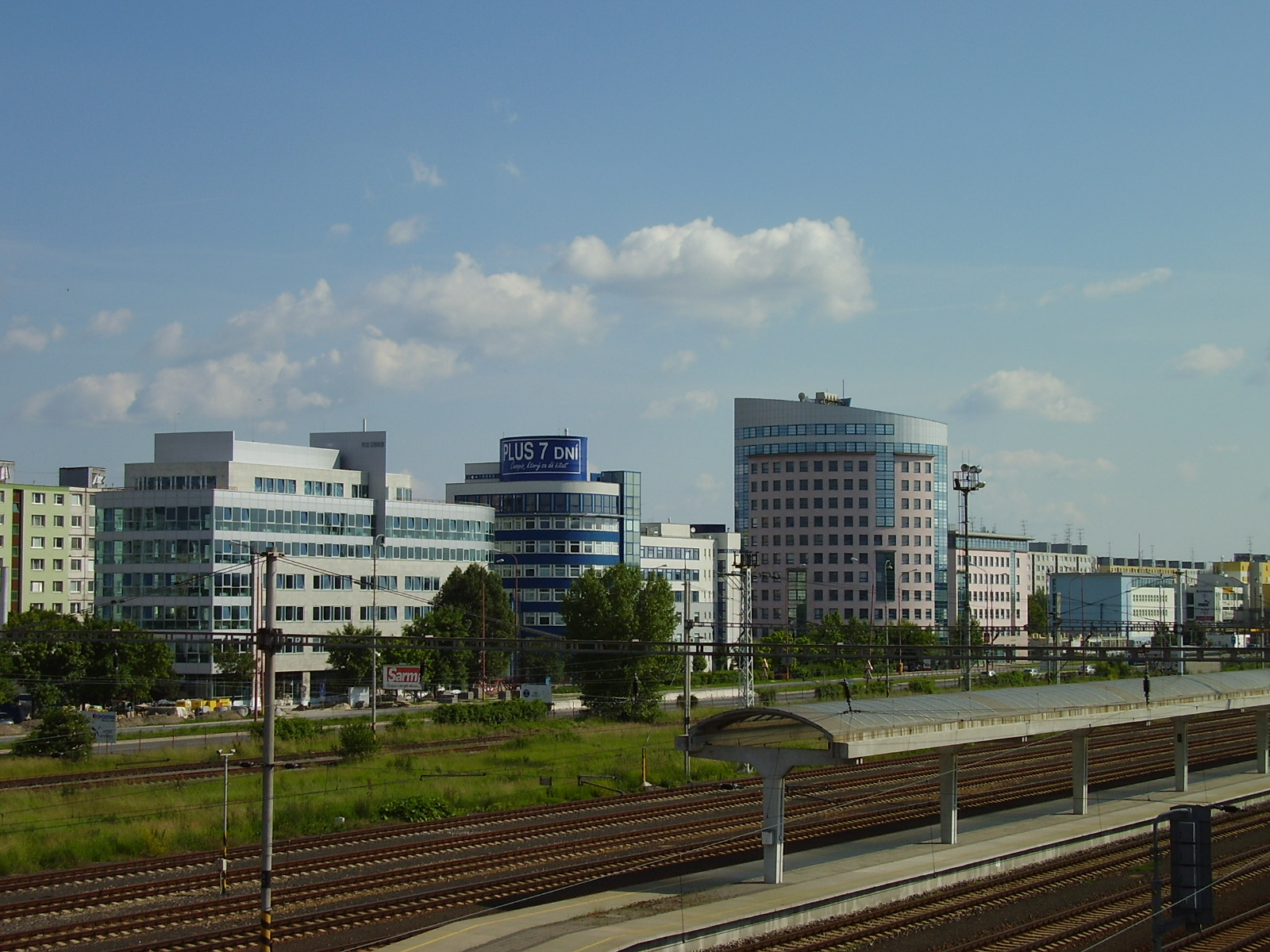 Panonska cesta, Bratislava